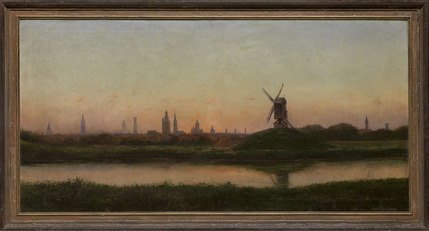 Gezicht op Brugge, Kruisvest (Bruno De Simpel, 19de eeuw); collection: Musea Brugge - Groeningemuseum